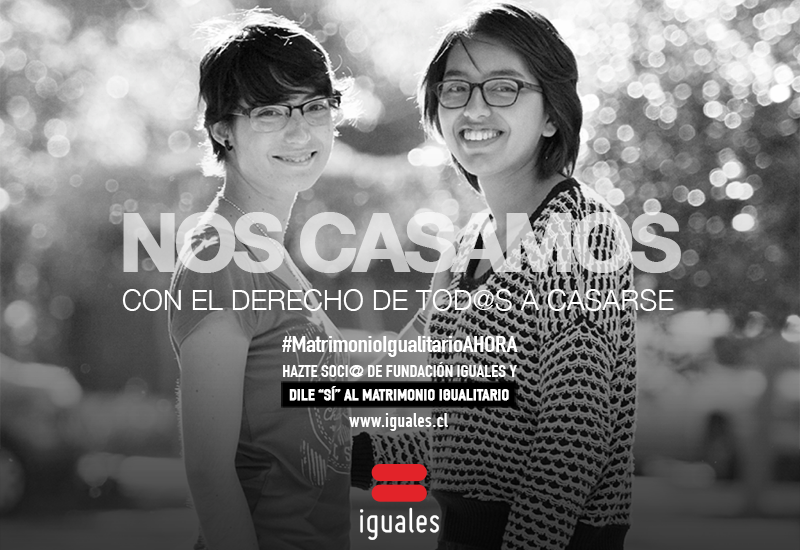 Campaña Cásate con Nosotros/as